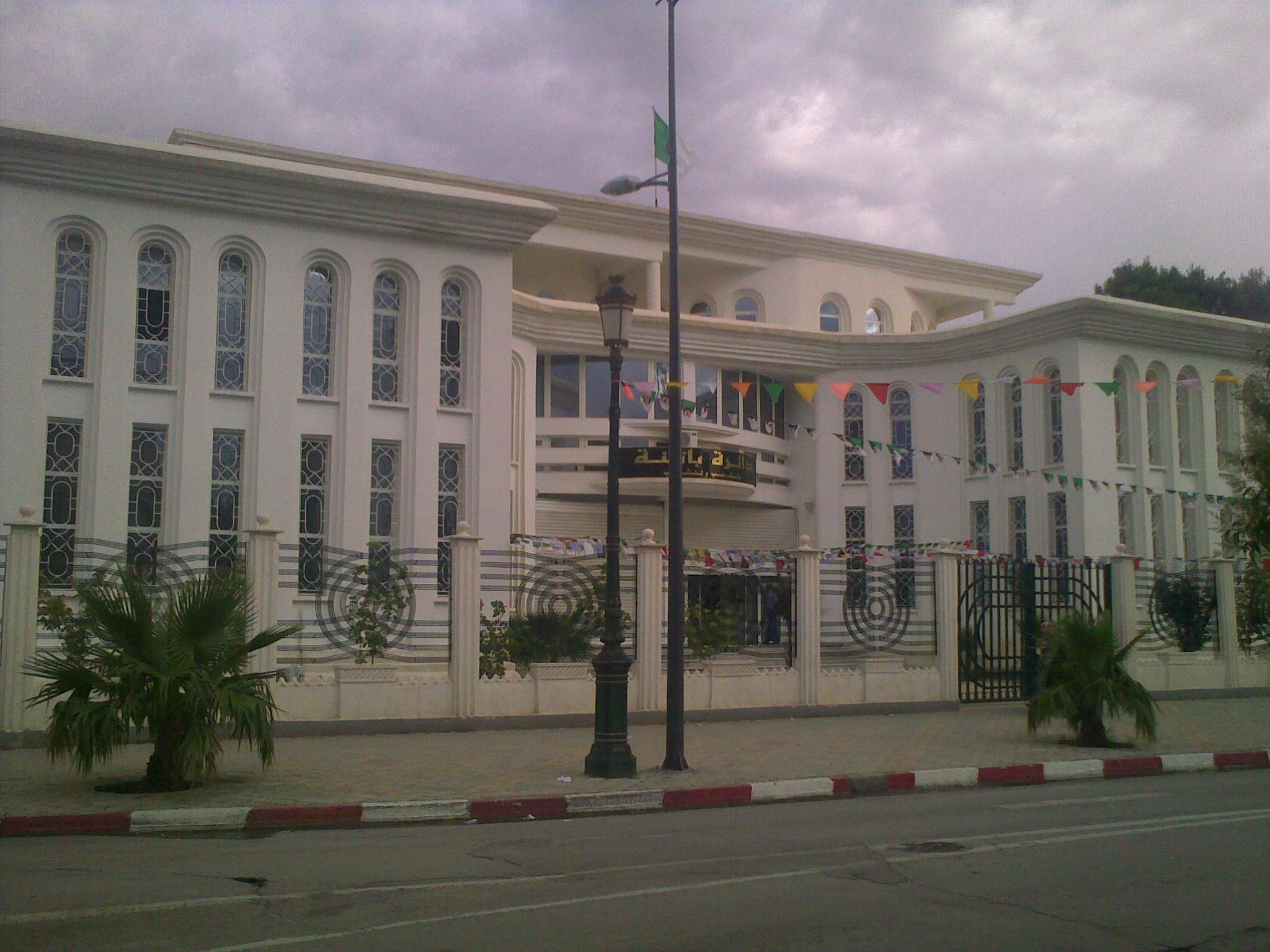 la Daira de Batna